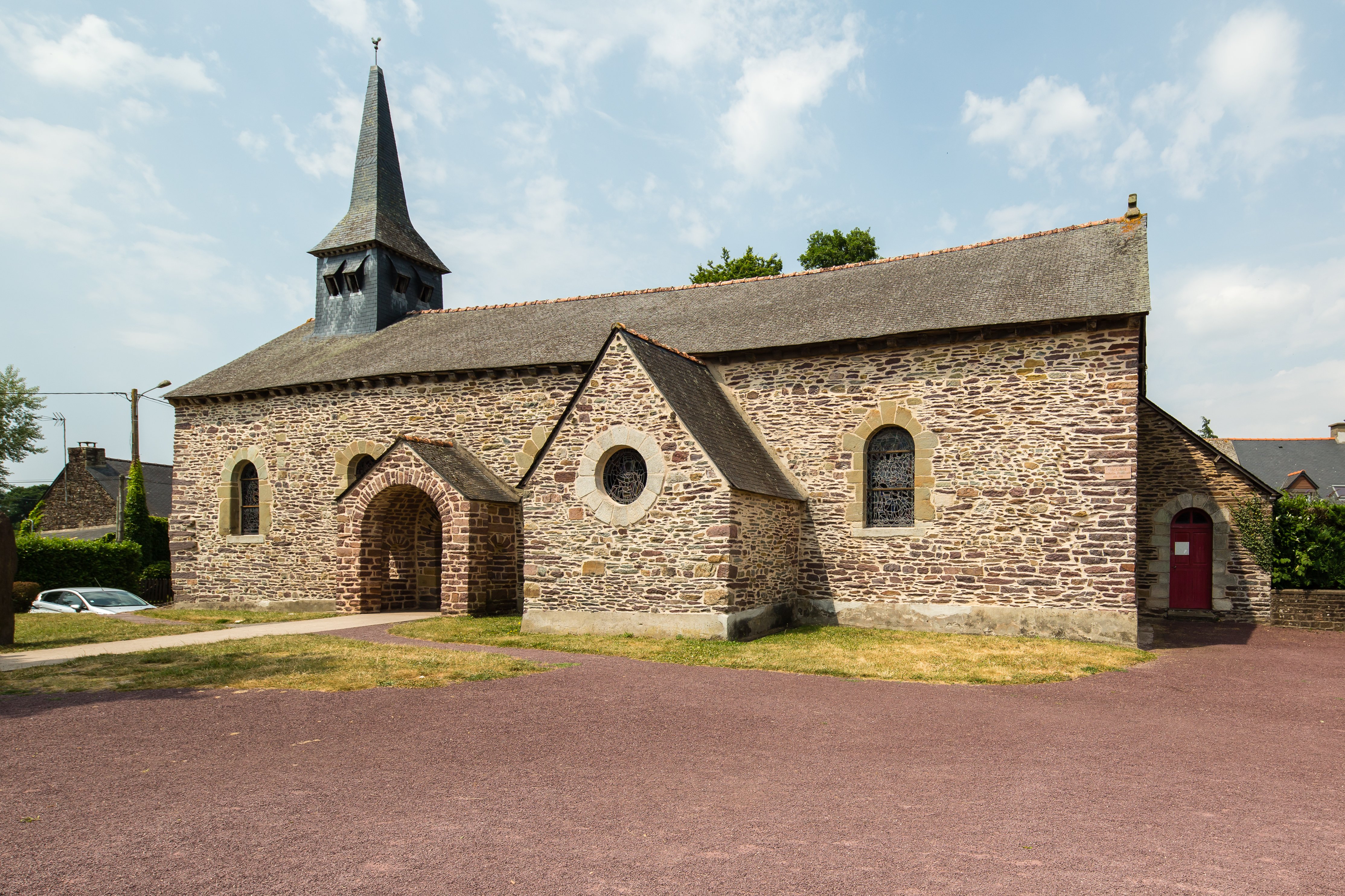 Église Saint-Onenne de Tréhorenteuc (France).